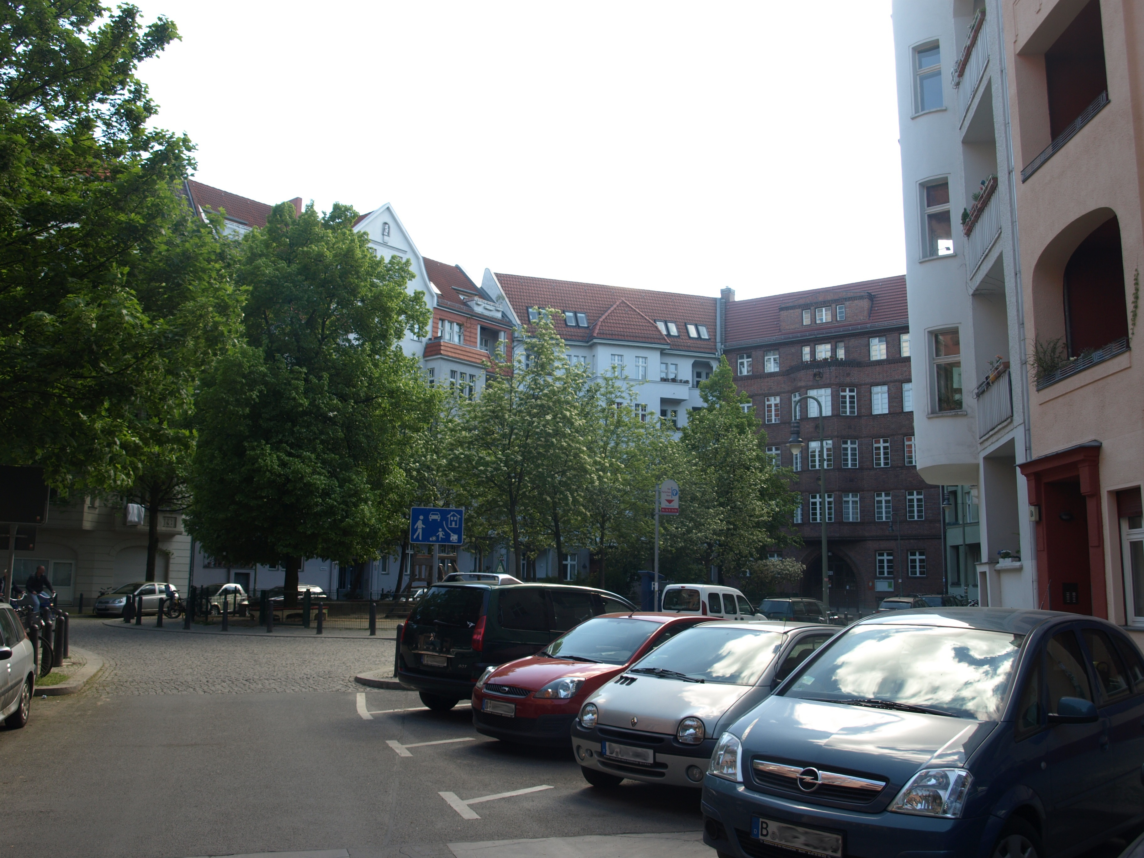 Berlin-Prenzlauer Berg Göhrener Straße